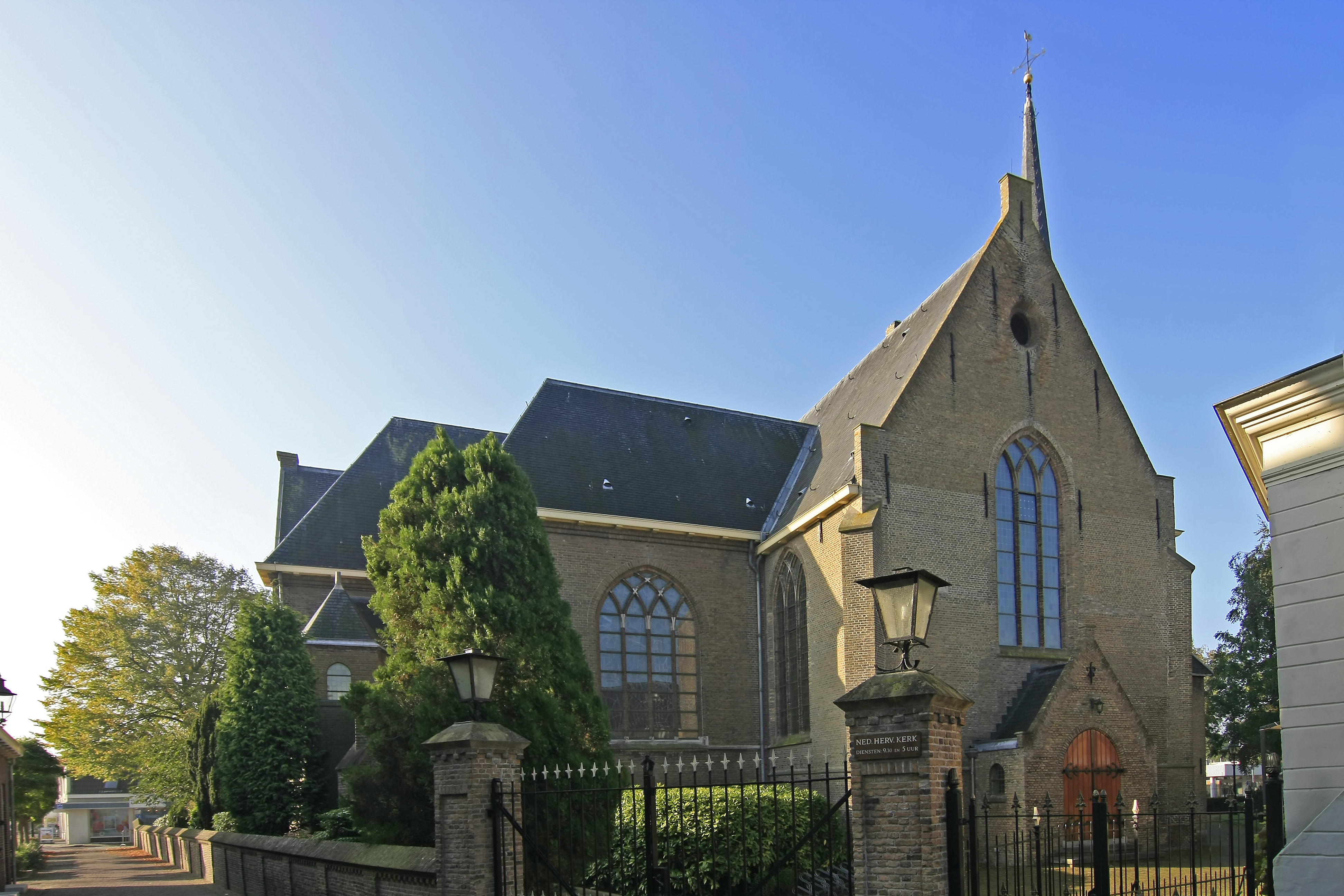 Hervormde Kerk